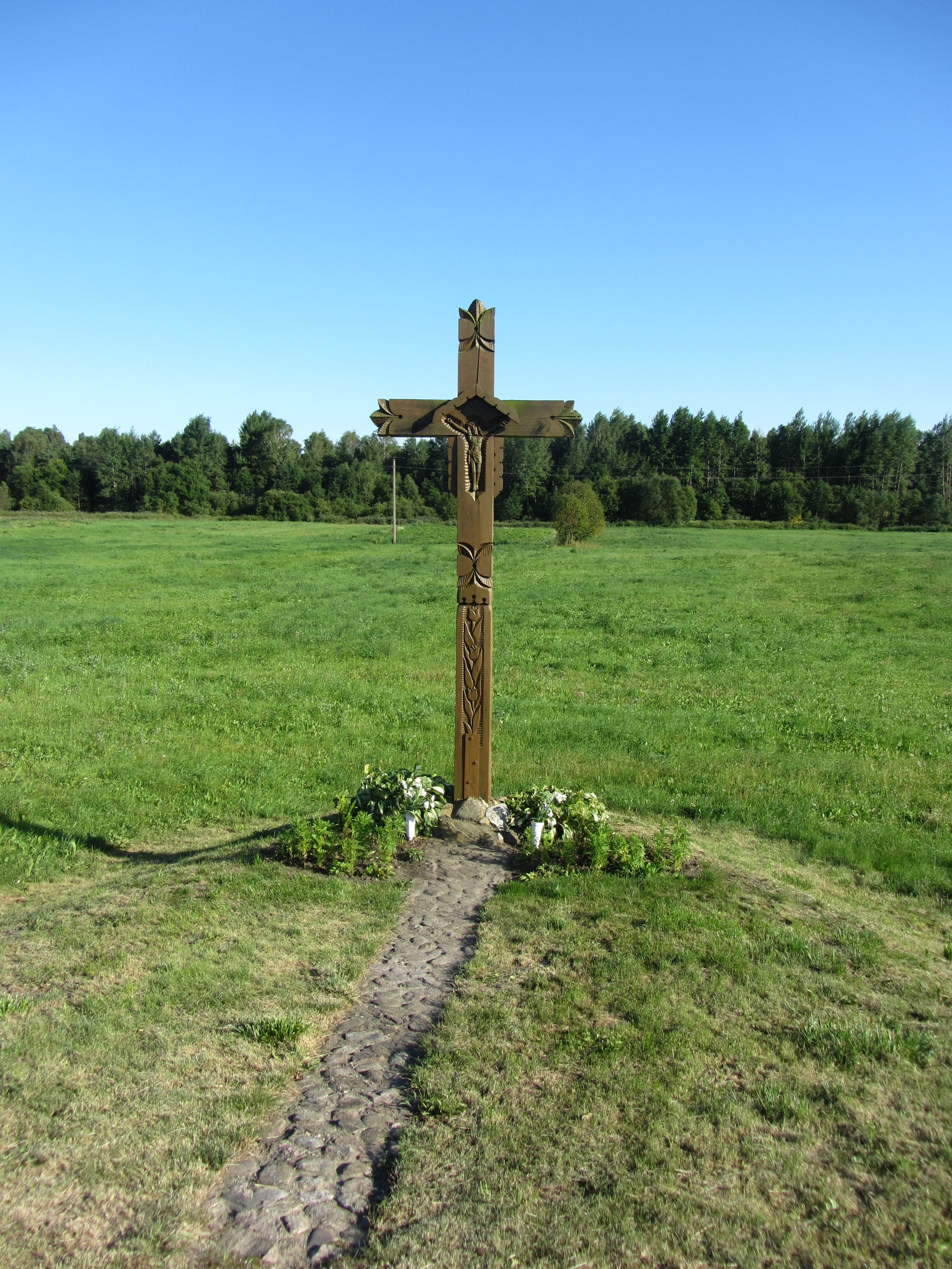 Avižonys 19131, Lithuania